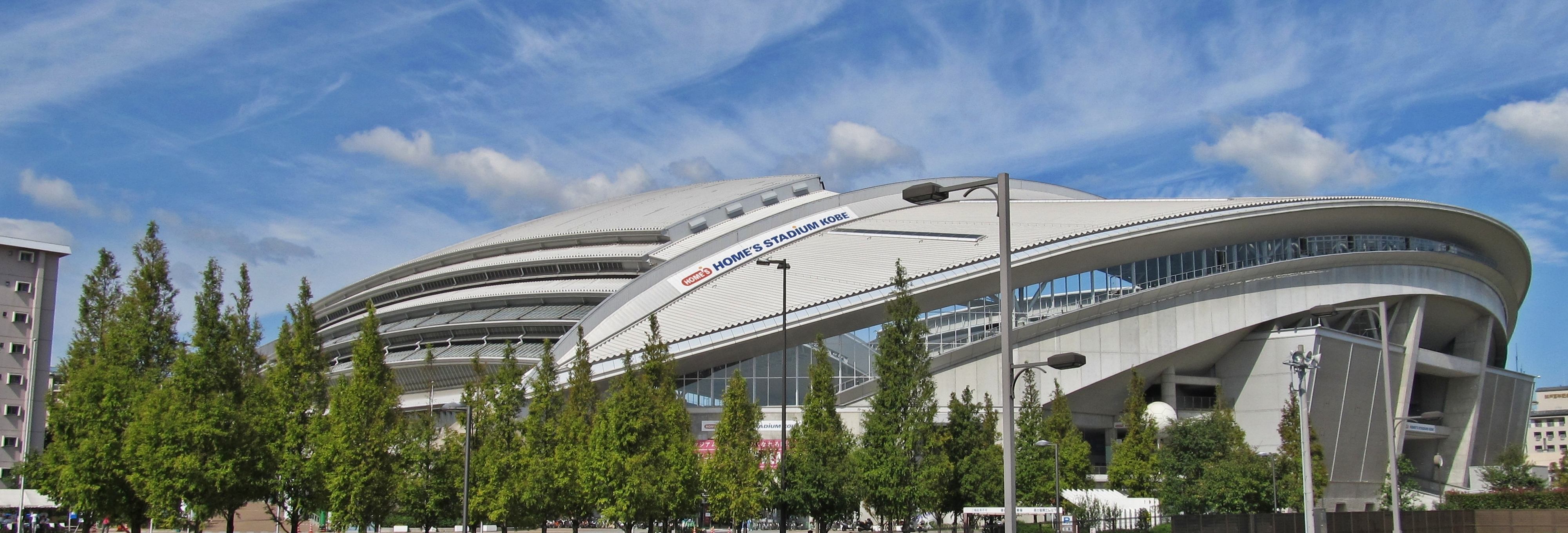 御崎公園球技場（神戸ウイングスタジアム）。所在地は兵庫県神戸市兵庫区御崎町1丁目2